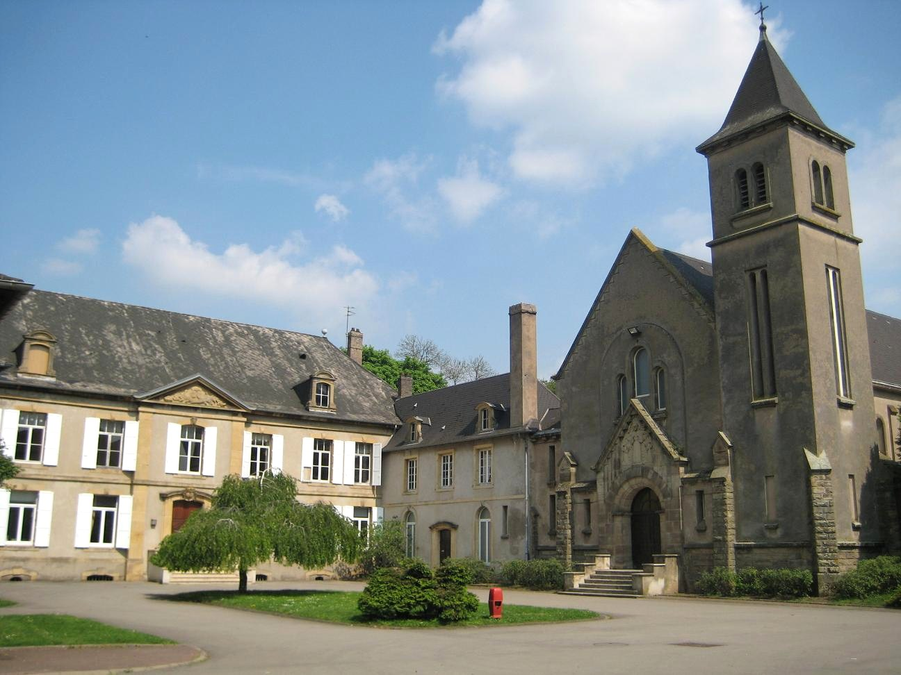 Chateau de Pepinville, à Richemont (Moselle)